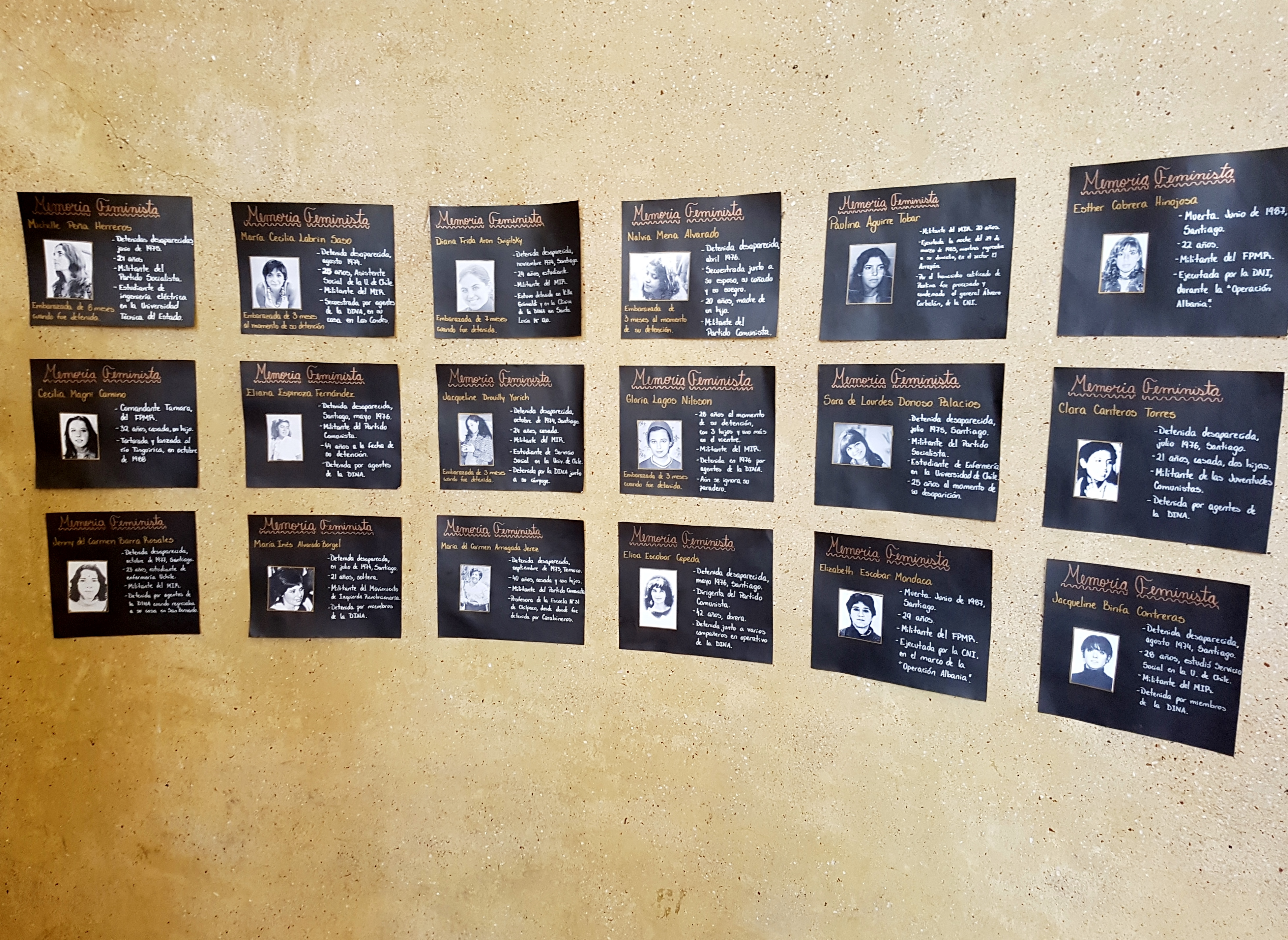 Pequeño memorial a detenidas desaparecidas, estudiantes y profesoras; Escuela de Derecho de la Universidad de Chile.